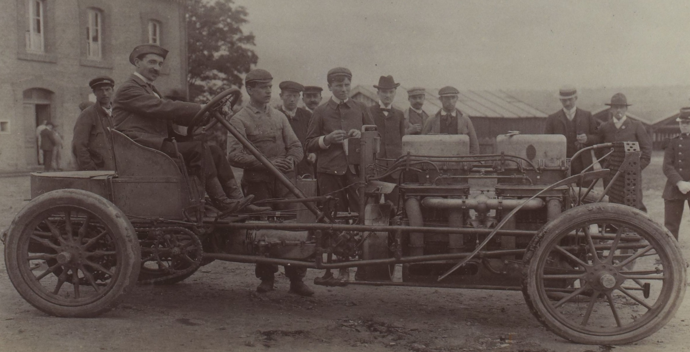 [Collection Jules Beau. Photographie sportive] : T. 23. Année 1903 / Jules Beau : F. 29v. [Meeting de côte de Château-Thierry, 4 octobre 1903]